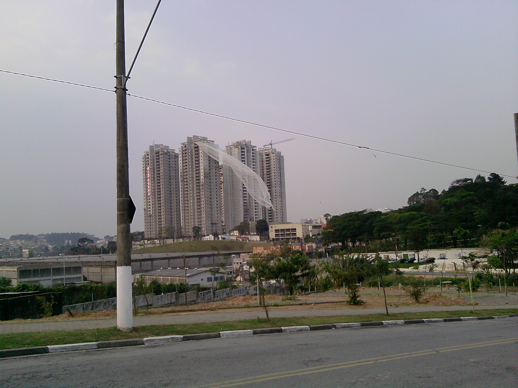 Construção do Condominio Ecos Club